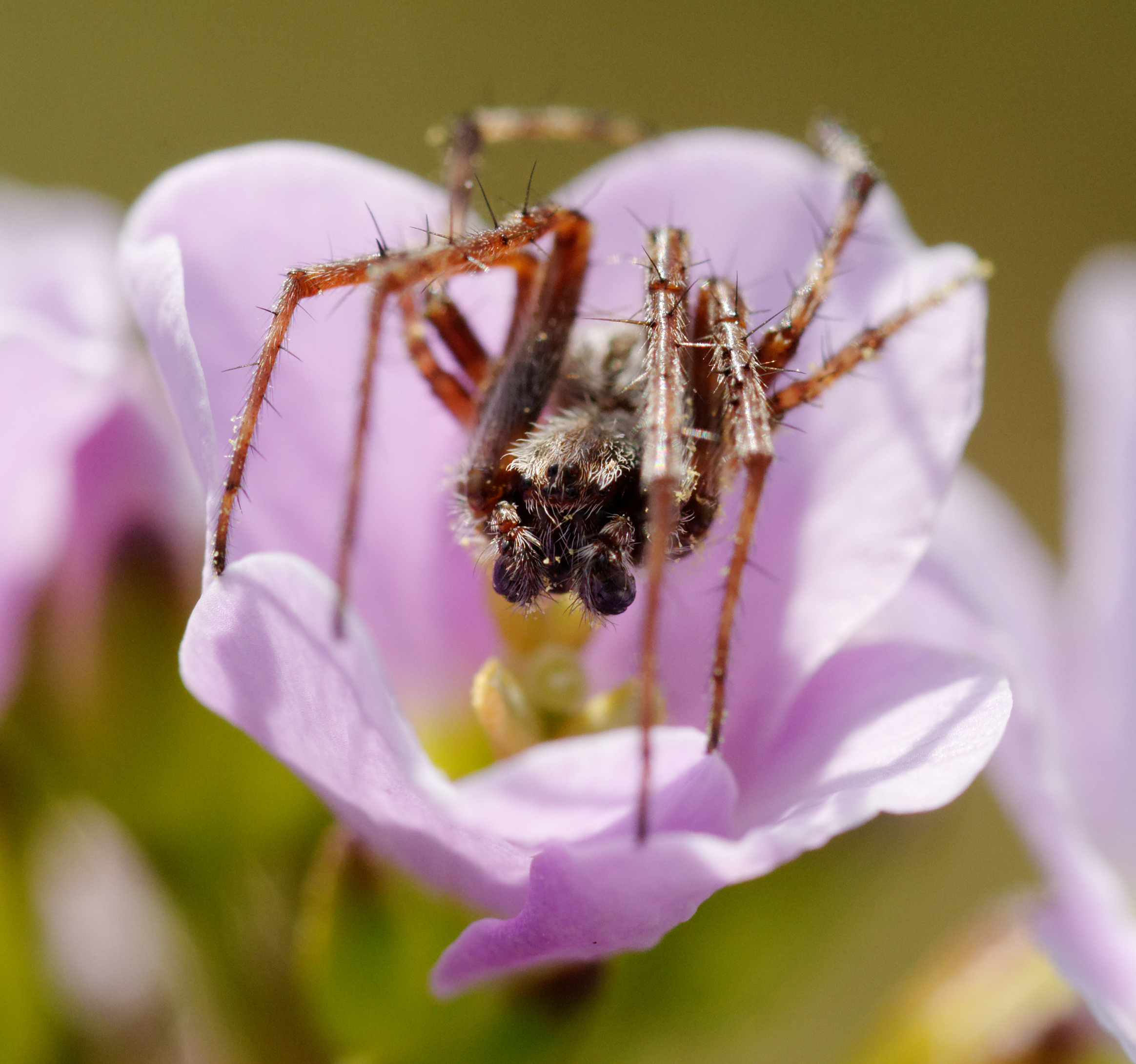 Araignée (Agalenatea redii) sur une fleur.